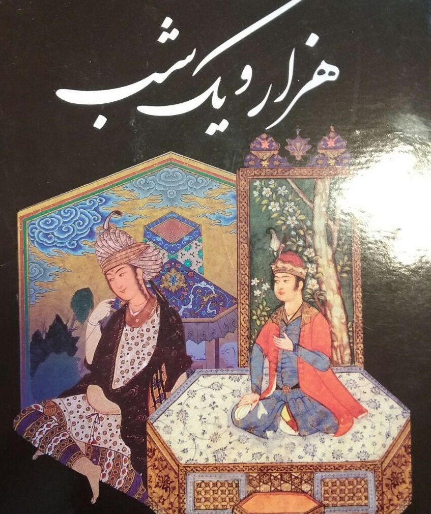 Tusen og en natt